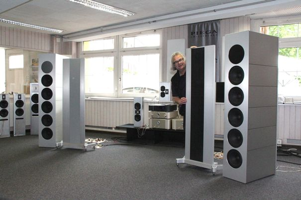 Piega Master Line Source und Kurt Scheuch